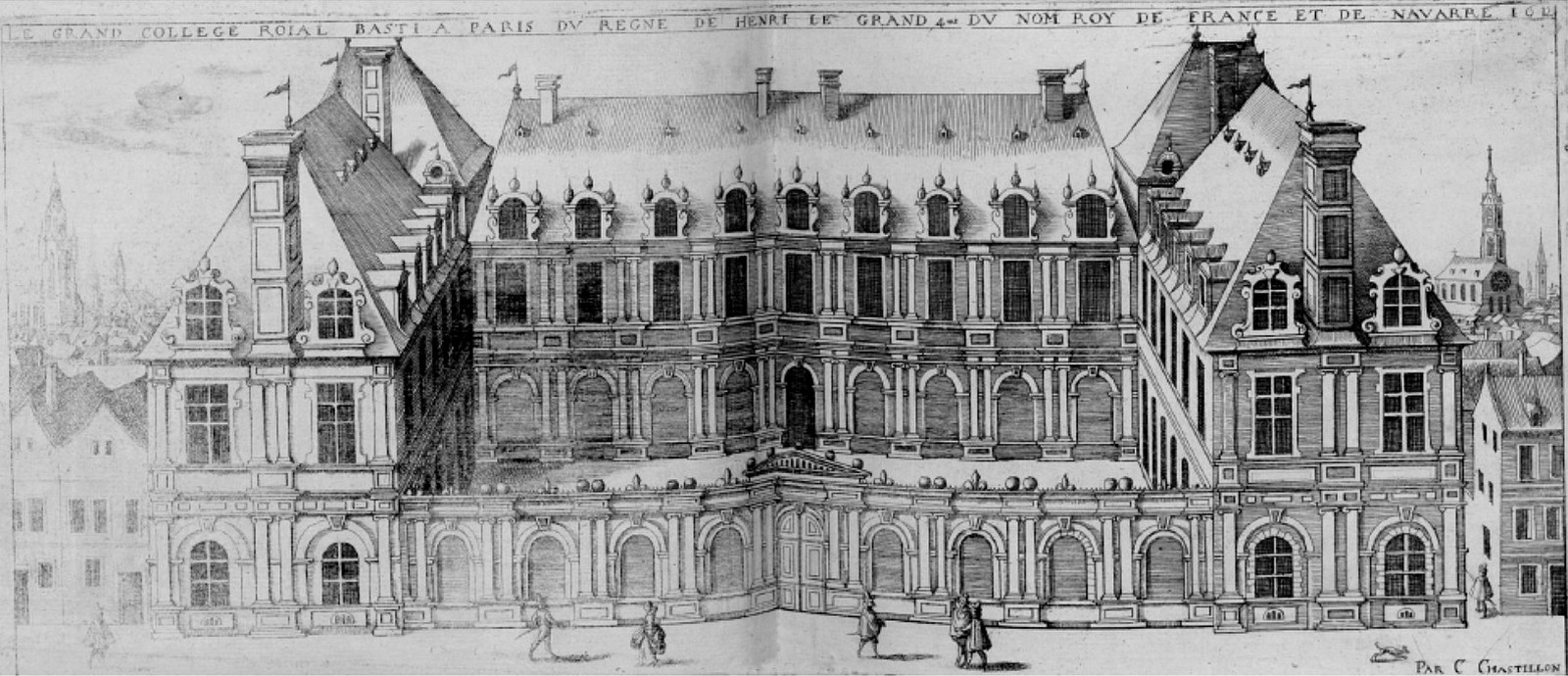 Le collège royal, futur collège de France, dessiné par Claude Chastillon - 1612